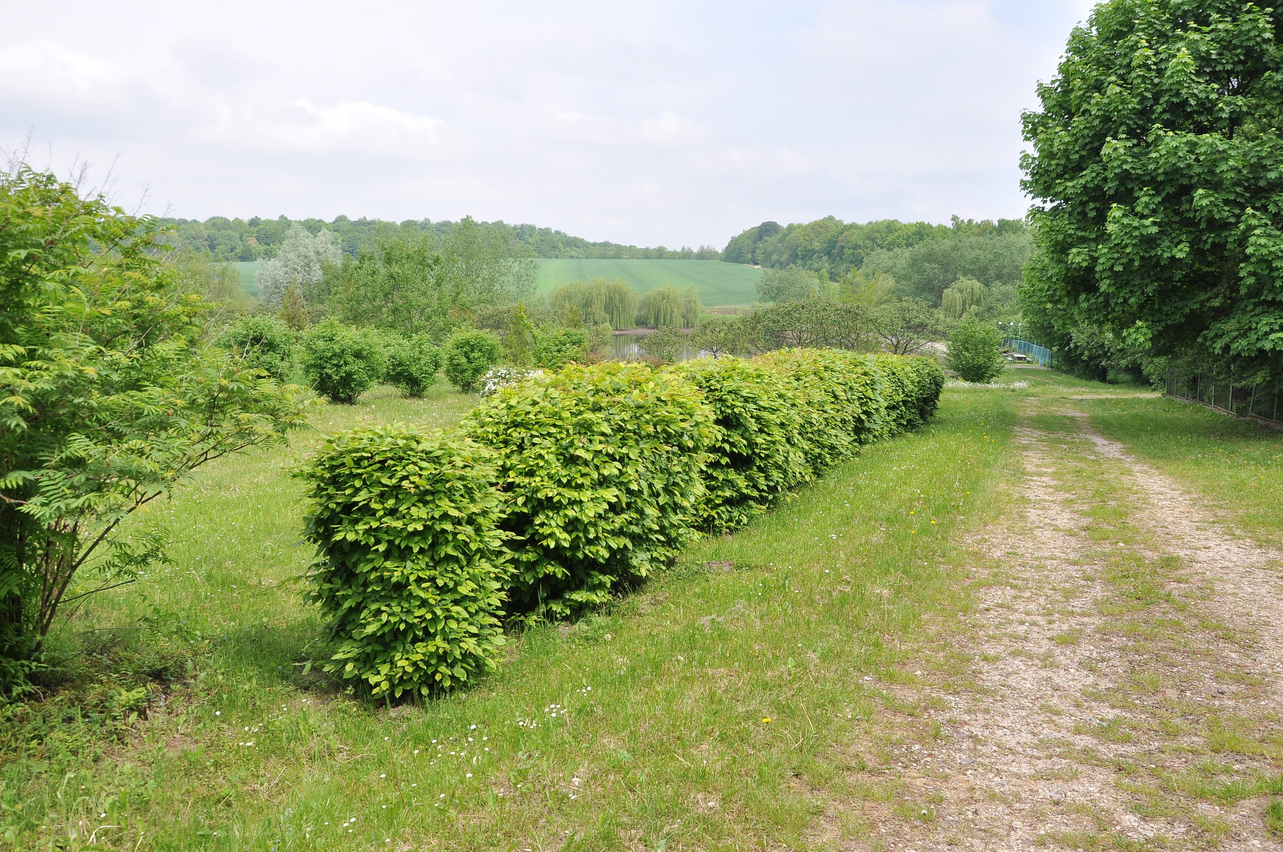 Ботанічний сад «Червона калина» на території навчально-оздоровчого комплексу «Червона калина» Тернопільського державного медичного університету поблизу смт Дружба та с. Лошнів Теребовлянського району.